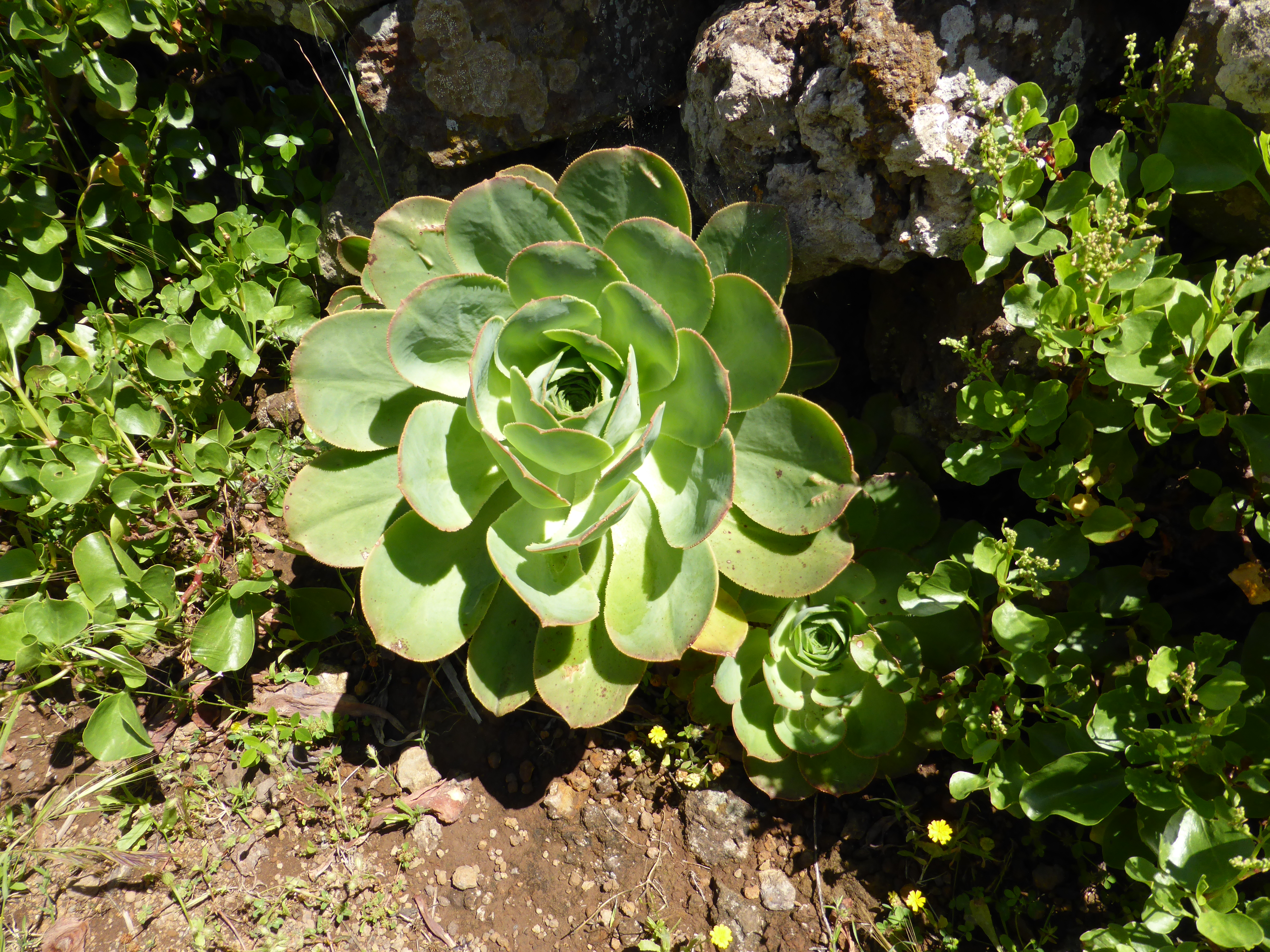 Planta del género Aeonium, familia crasuláceas. Nombre científico: Aeonium hierrense. Nombre común, en la isla de El Hierro: sanjora. Fotografía tomada en una ladera cercana al parque eólico.